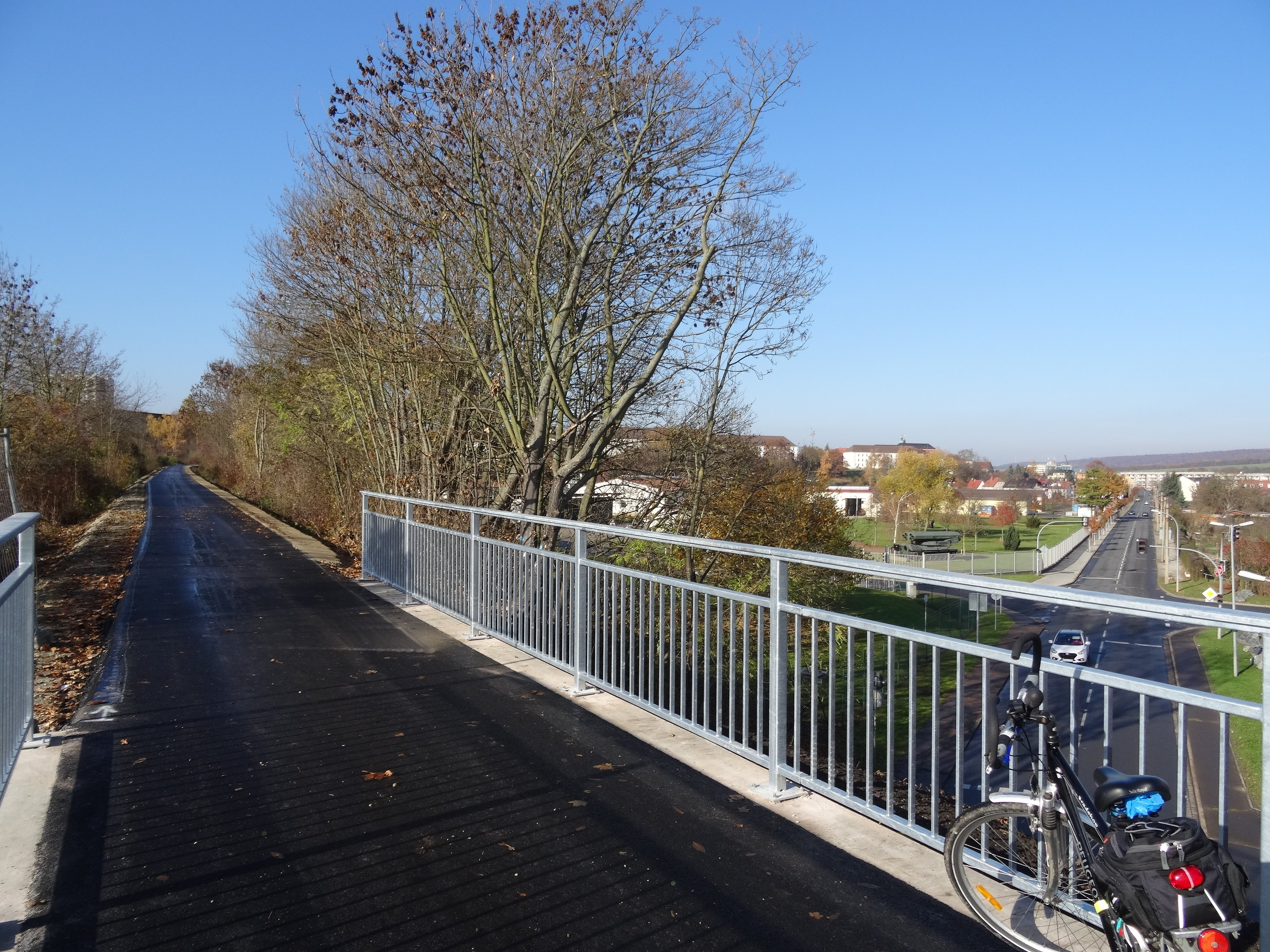 Unstrut-Werra-Radweg in Sondershausen